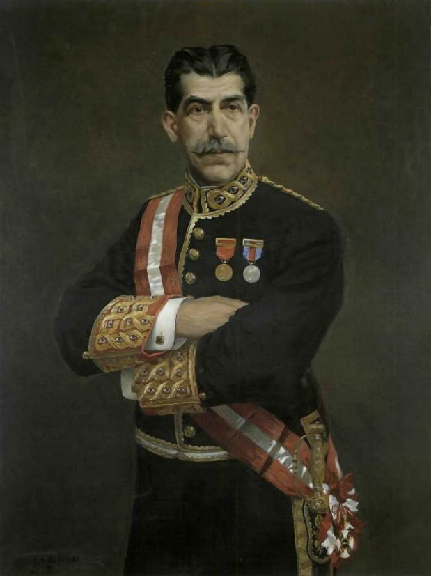 Portrait of Francisco Bergamín y García, by Luis herreros de Tejada